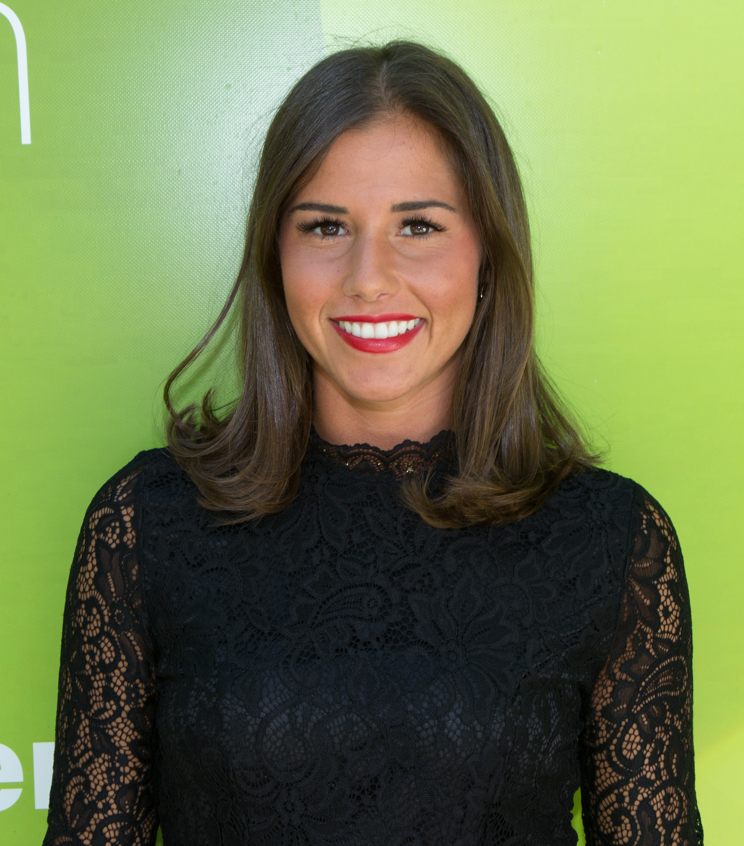 Sarah Lombardi als Gast im ZDF-Fernsehgarten am 16. September 2018 in Mainz.